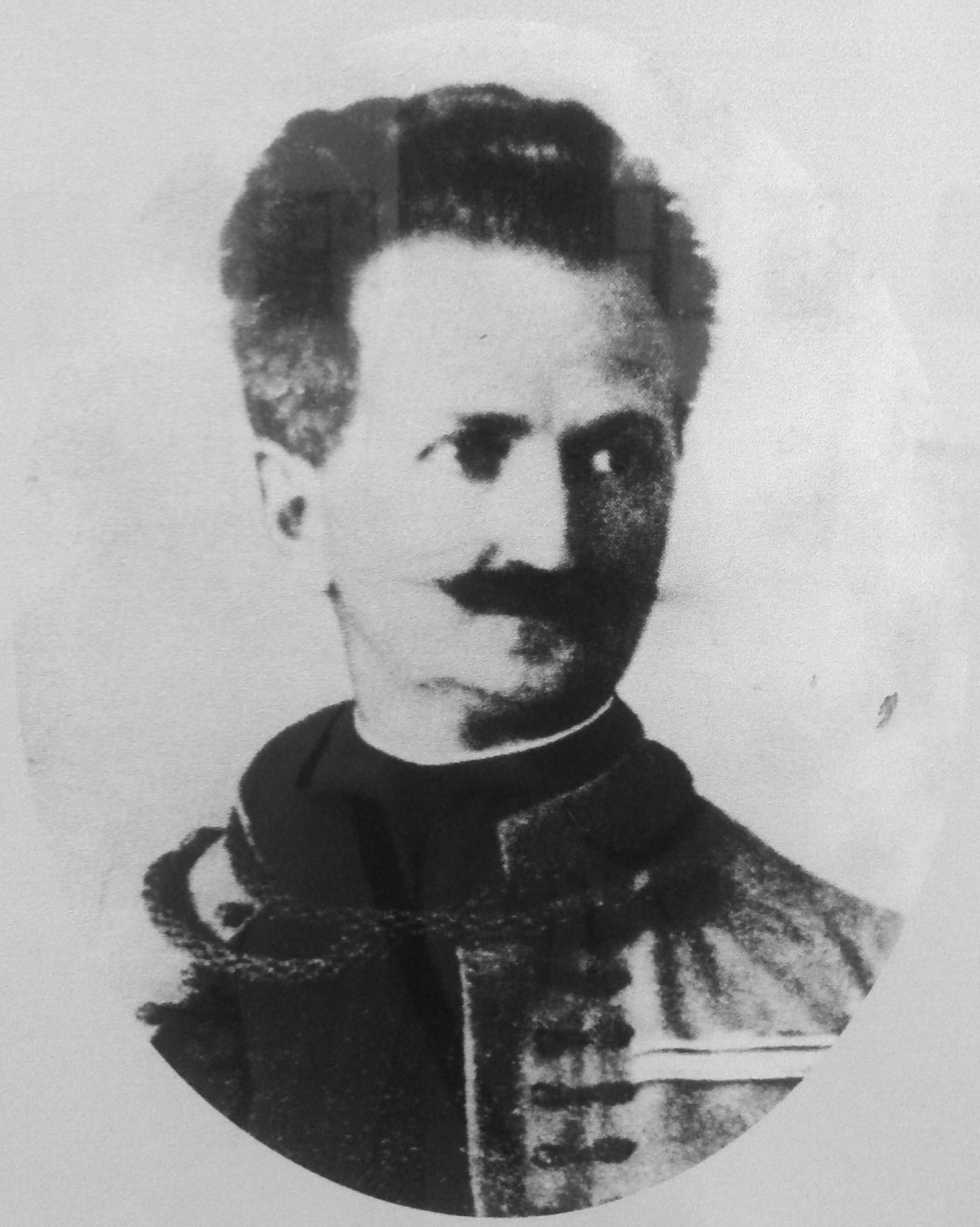 Момир Коруновић, познати архитекта